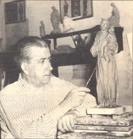 Martín Simón en su taller.